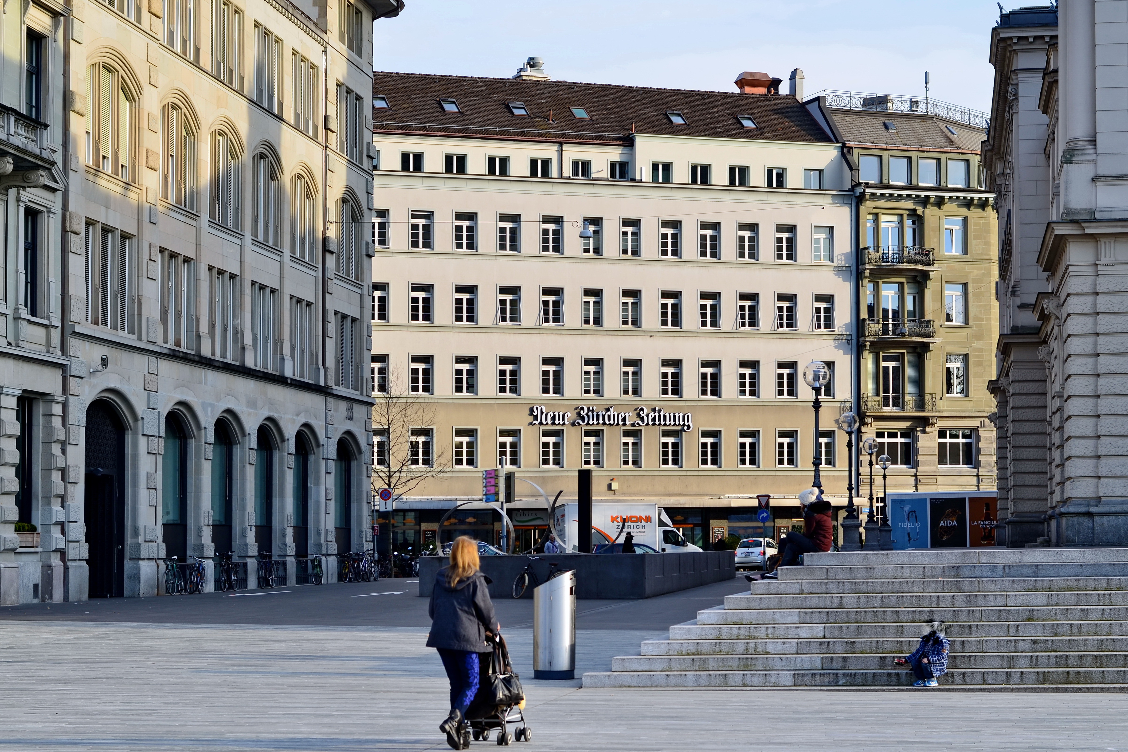 Redaktionsarchiv der Neuen Zürcher Zeitung, Ansicht vom Sechselätzenplatz